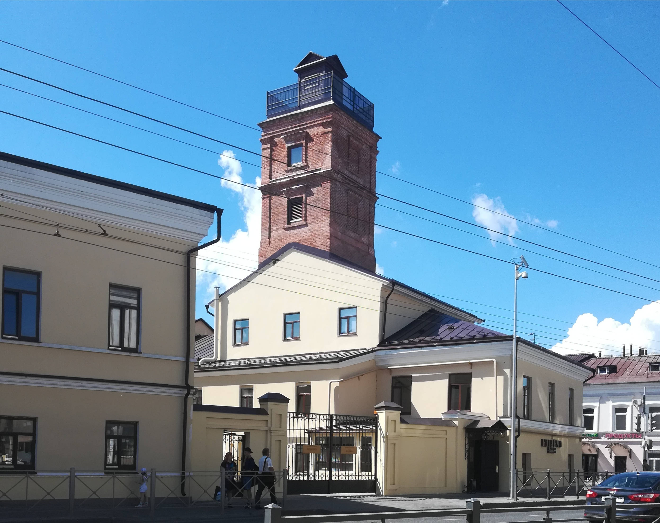 Московская улица в Казани